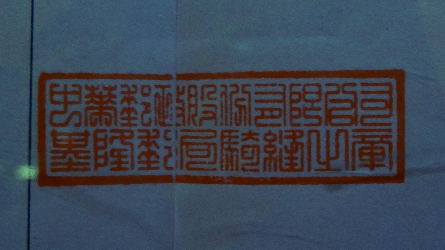 2015年2月24日蓋印的中華郵政基隆郵局騎縫章。